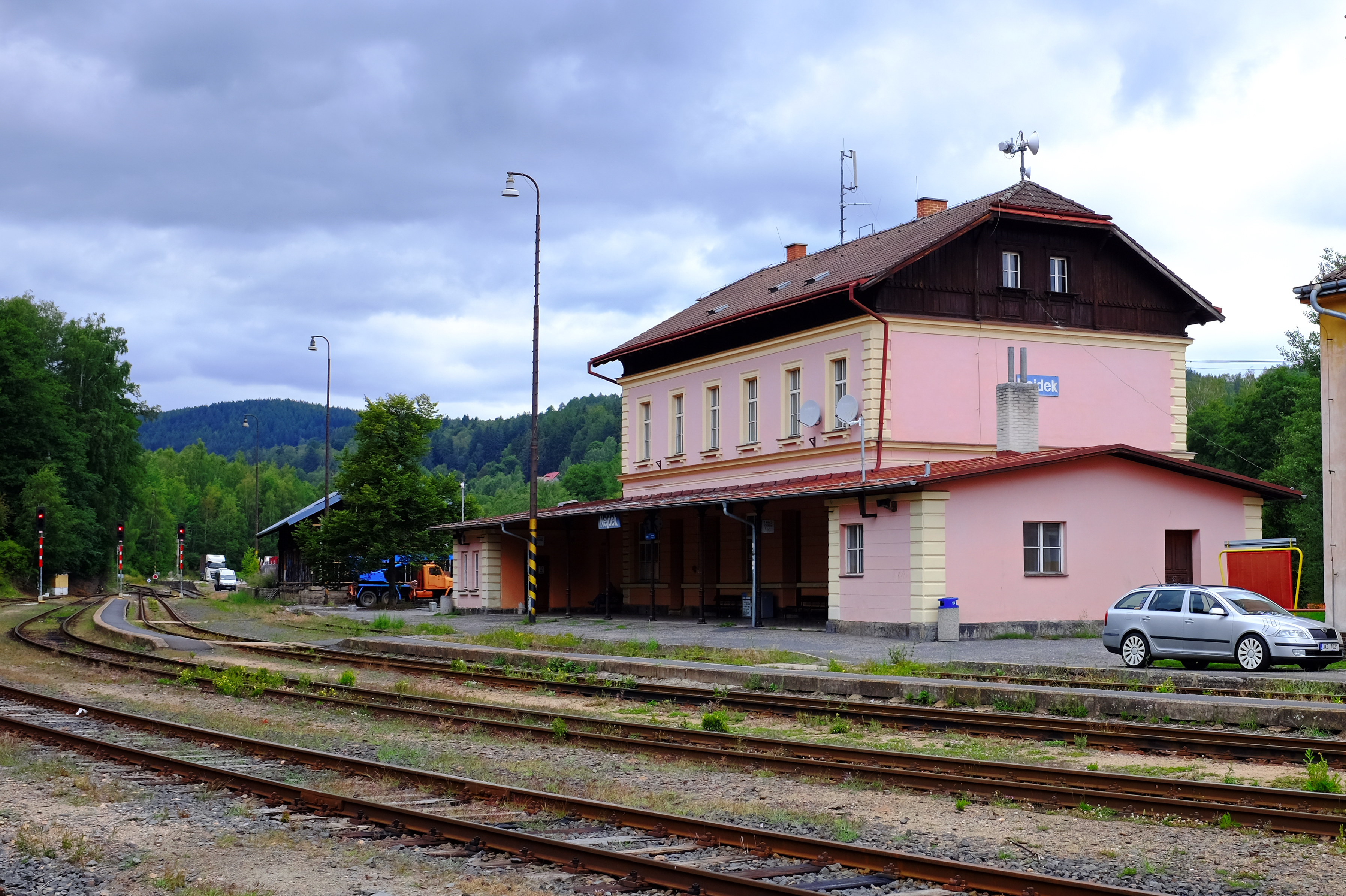 Vlakové nádraží v Nejdku, okres Karlovy Vary